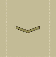 ՀՀ ԶՈՒ եֆրեյտոր զինվորական կոչում